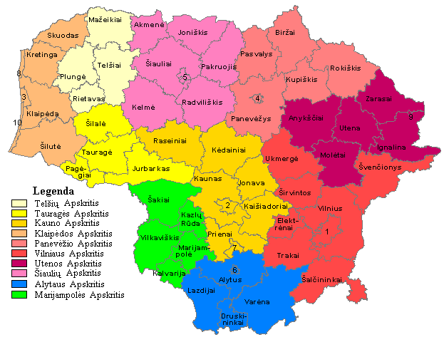 Lietuvos savivaldybės. Skaičiais pažymėta: - Vilniaus miesto savivaldybė - Kauno miesto savivaldybė - Klaipėdos miesto savivaldybė - Panevėžio miesto savivaldybė - Šiaulių miesto savivaldybė - Alytaus miesto savivaldybė - Birštono savivaldybė - Palangos miesto savivaldybė - Visagino miesto savivaldybė - Neringos savivaldybė